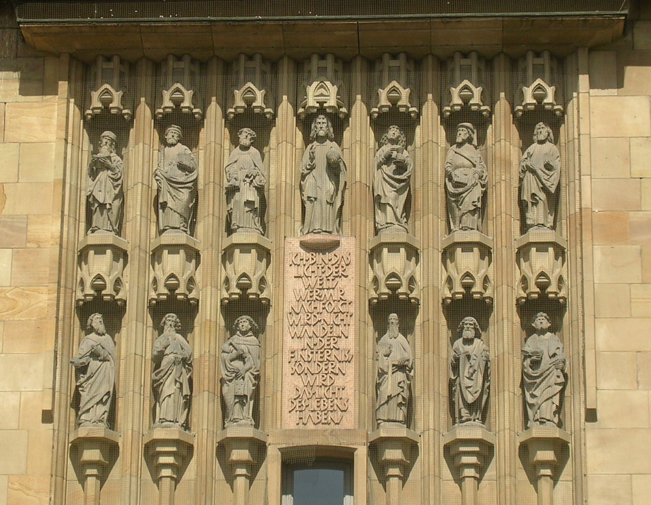 Stiftskirche Stuttgart, Figuren über dem Aposteltor (vom alten Aposteltor von 1494); Jesus und die zwölf Apostel, mit Inschrift